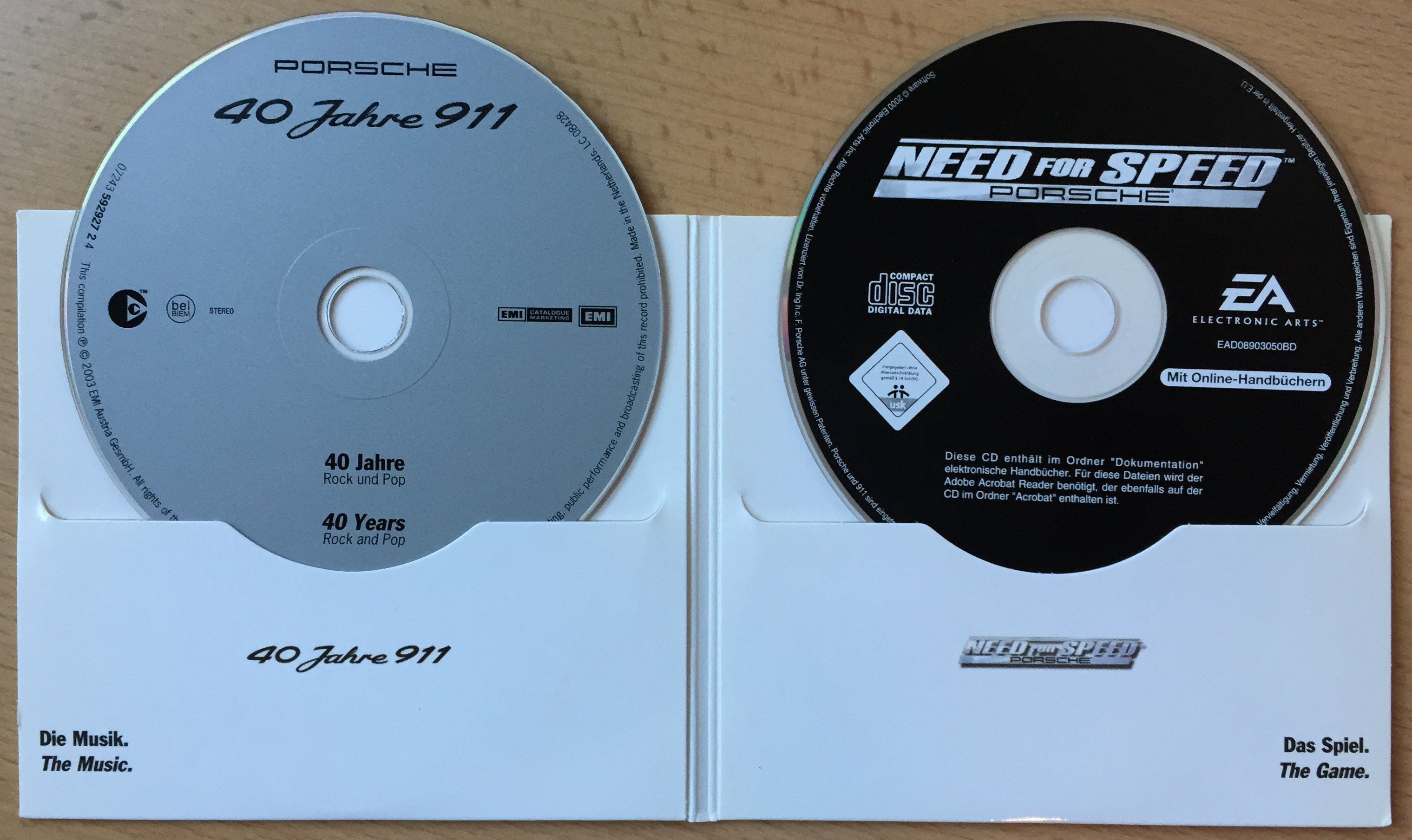 NFS Porsche - 40 Jahre - Spiel & Audio-CD - Darstellung ohne SH